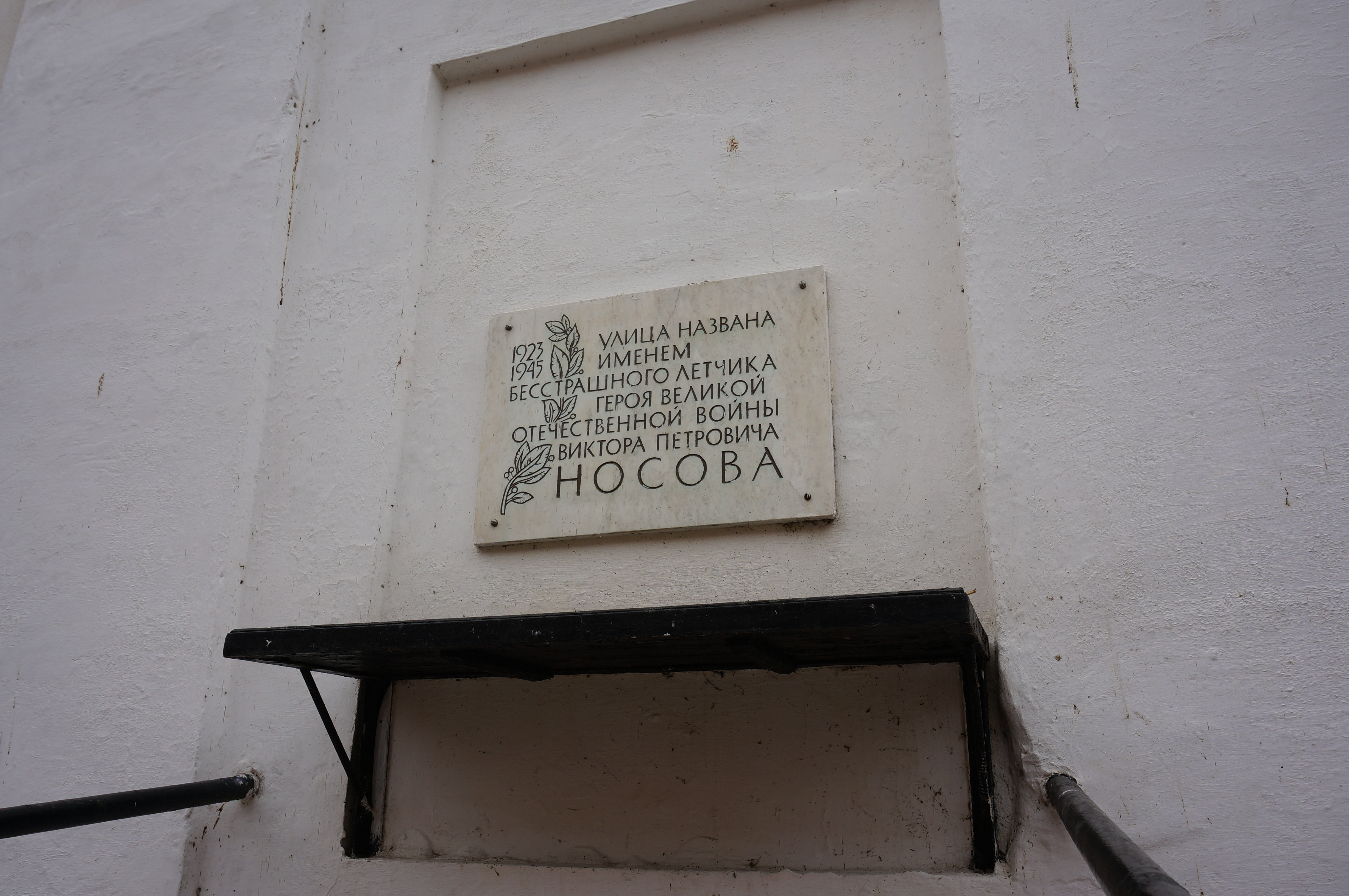 Россия, Тольятти, ул. Носова 10. Здание клуба на 420 мест архитектора И. Е. Рожина из института Ленгипрогор. В проекте предусматривались зрительный зал на 320 мест, фойе-лекционный зал на 280 мест, читальный зал на 180 мест и спортивный зал на 100 мест. Строительство началось в 1963 году, заказчиком являлся судоремзавод, подрядчиком СМУ № 7 КГС. В 1964 году задние было сдано. В 2001 году началась реконструкция здания. Ныне в нём находится досуговый центр «Русич». Памятная табличка, поясняющая название улицы.